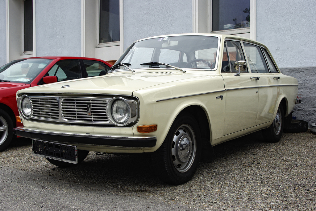 Volvo 144 2.0L